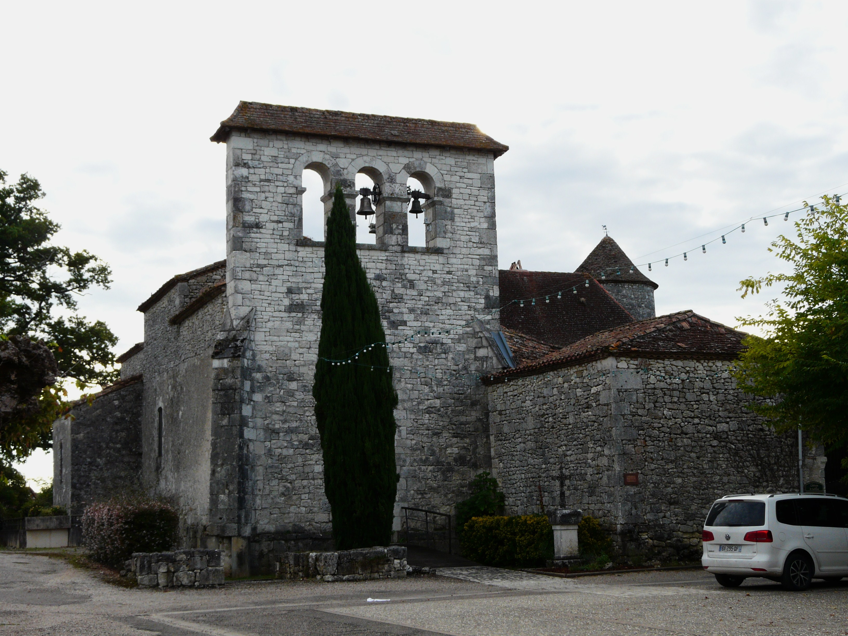 L'église Sainte-Anne, Sadillac, Dordogne, France.